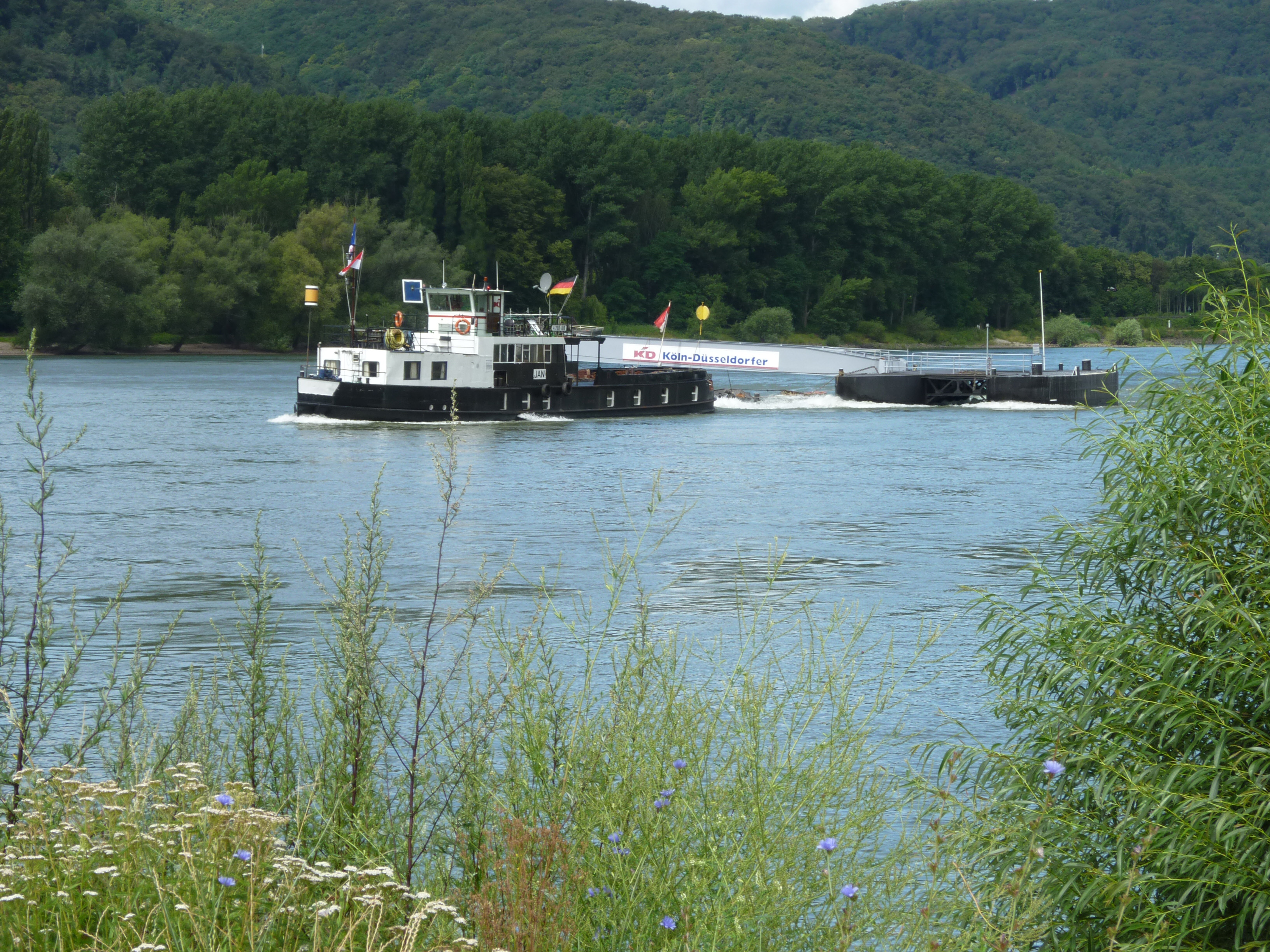 Werkstattschiff Jan mit Anleger im Schlepp